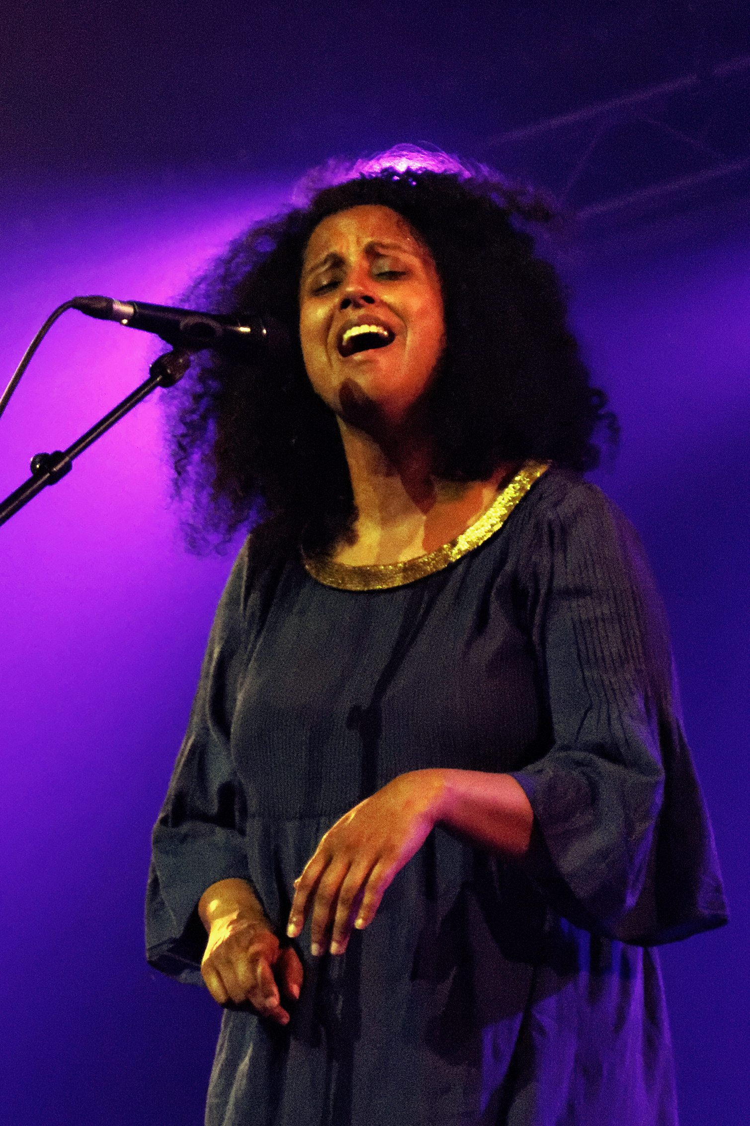 Susheela Raman en concert à l'espace Gradlon lors du festival de Cornouaille le 22 juillet 2014.